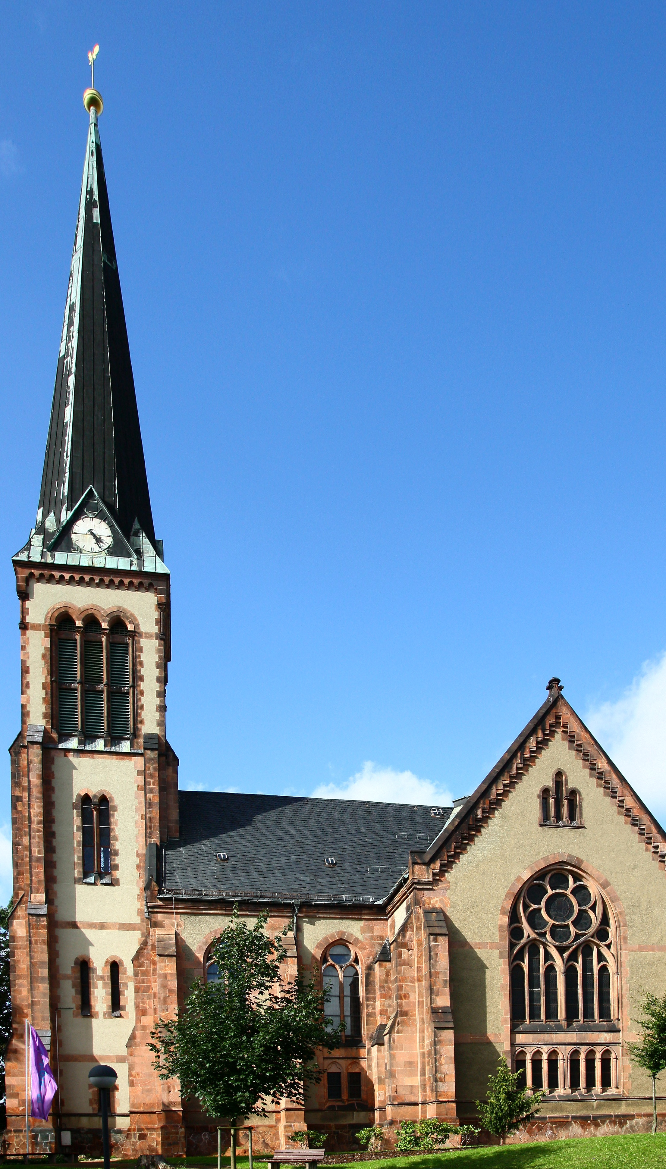 Die Martin-Luther-Kirche in Geringswalde 2010 - am Lutherplatz: erbaut: 1888-1890 / eingeweiht: 30. September 1890 / Architekt: Julius Zeißig, Leipzig / Baustil: Historismus, Neogotik